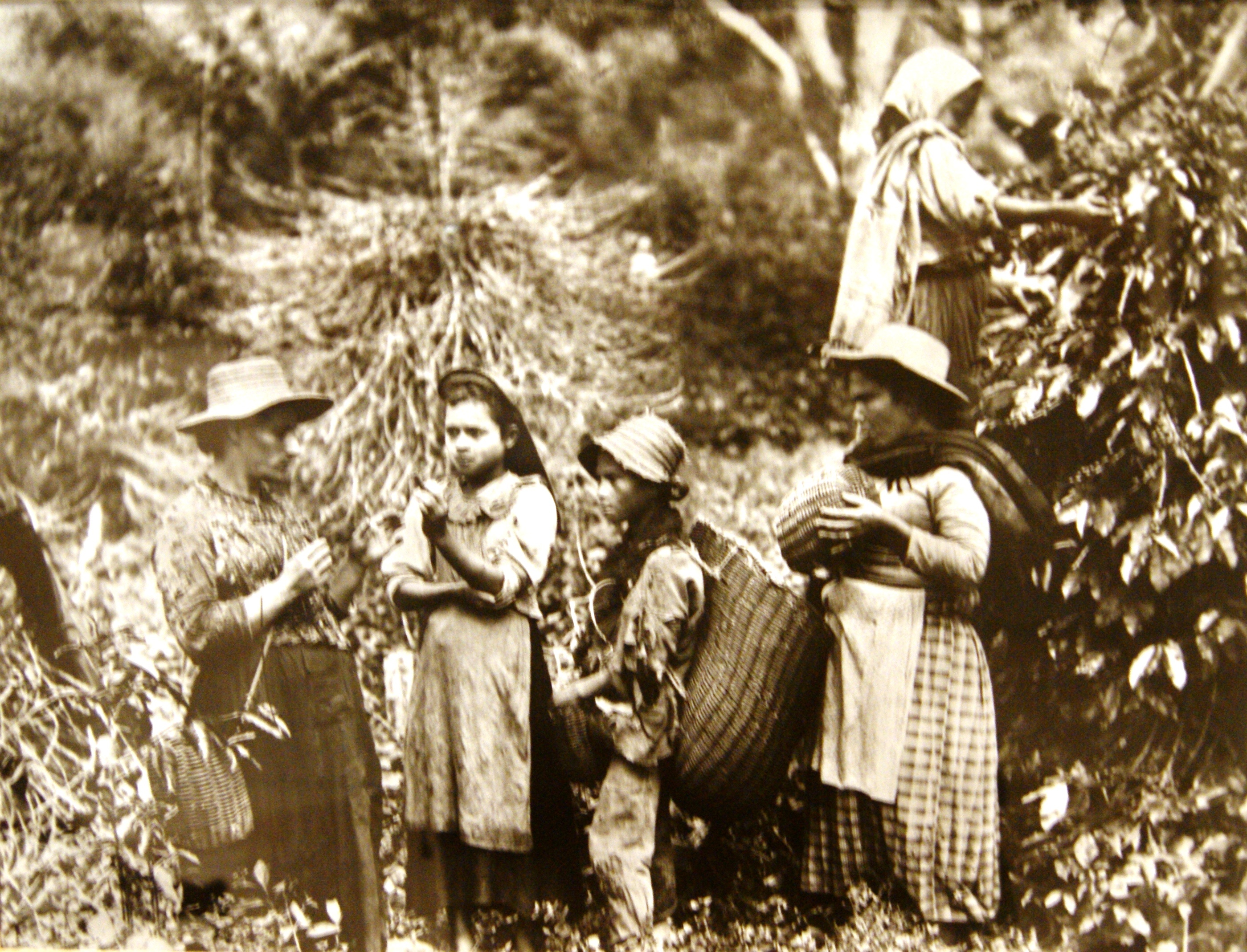 Fotografía de los Hermanos Rodríguez titulada "Las Chapoleras", niños/as que cosechan café. Año 1910. Museo de Antioquia. Medellín - Colombia.